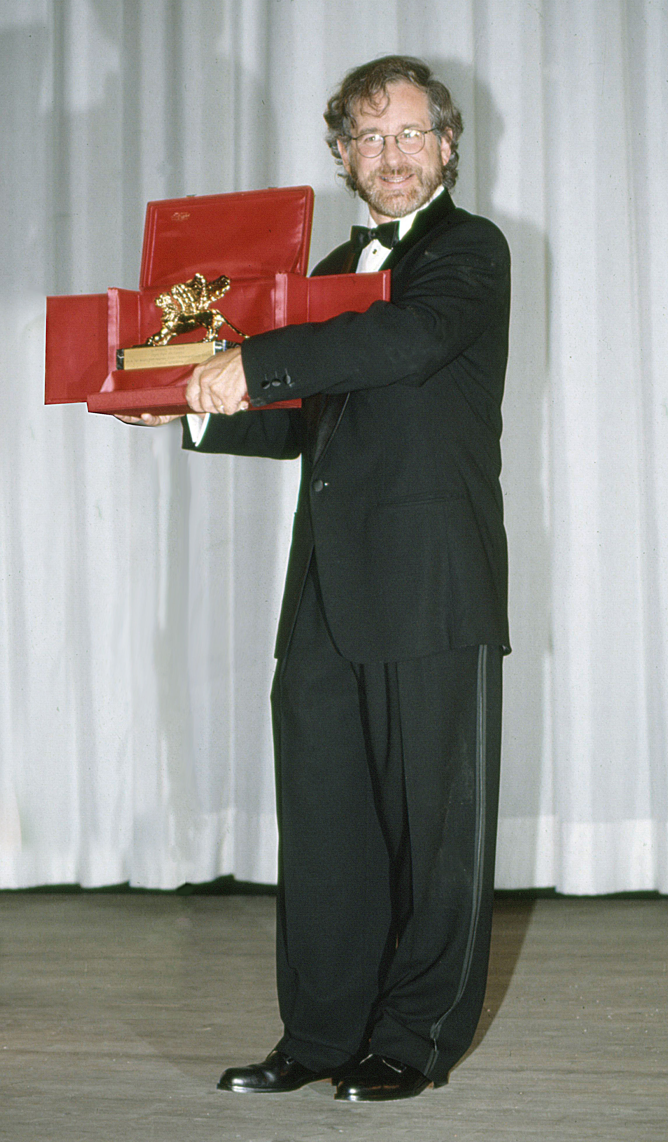 Steven Spielberg alla Mostra del Cinema a Venezia